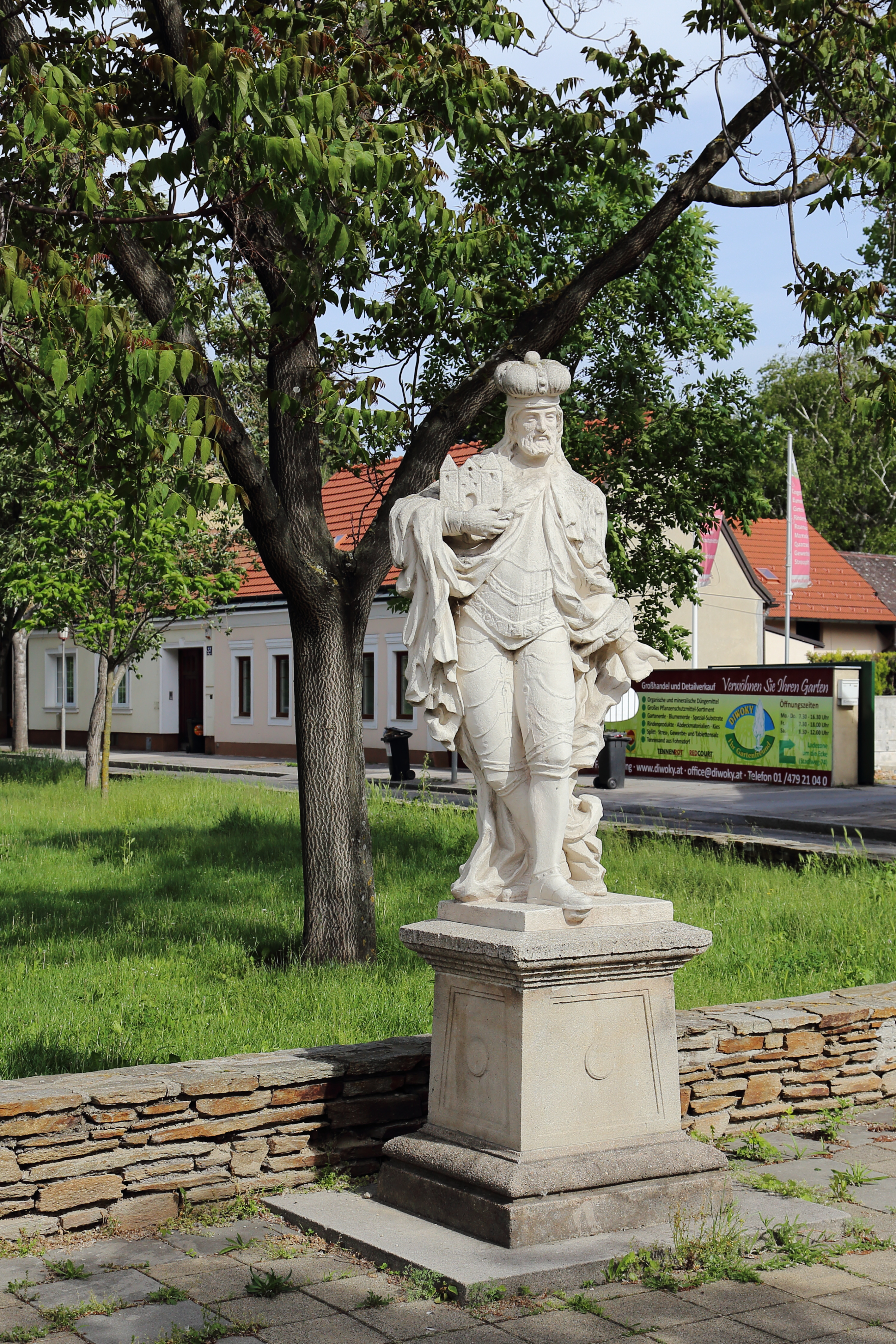 Leopoldstatue am östlichen Ende des Leopoldauerplatzes in Leopoldau, ein Ortsteil der österreichischen Hauptstadt Wien. Die Statue stammt aus dem 17. Jahrhundert und wurde später wahrscheinlich verändert. Sie stellt den hl. Leopold im Tanzschritt und einem Galaharnisch dar.